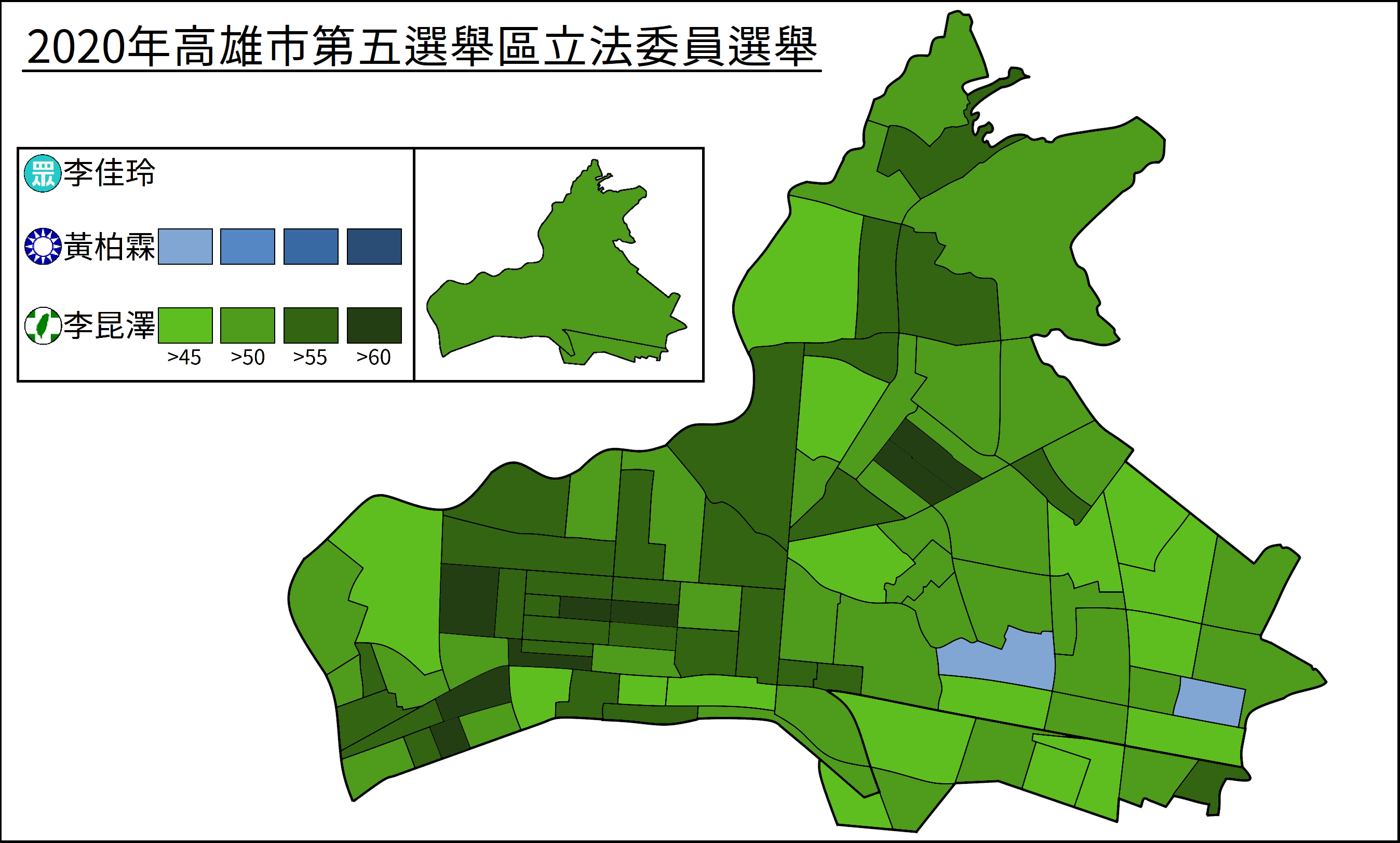 2020年中華民國立法委員選舉高雄第五選舉區得票